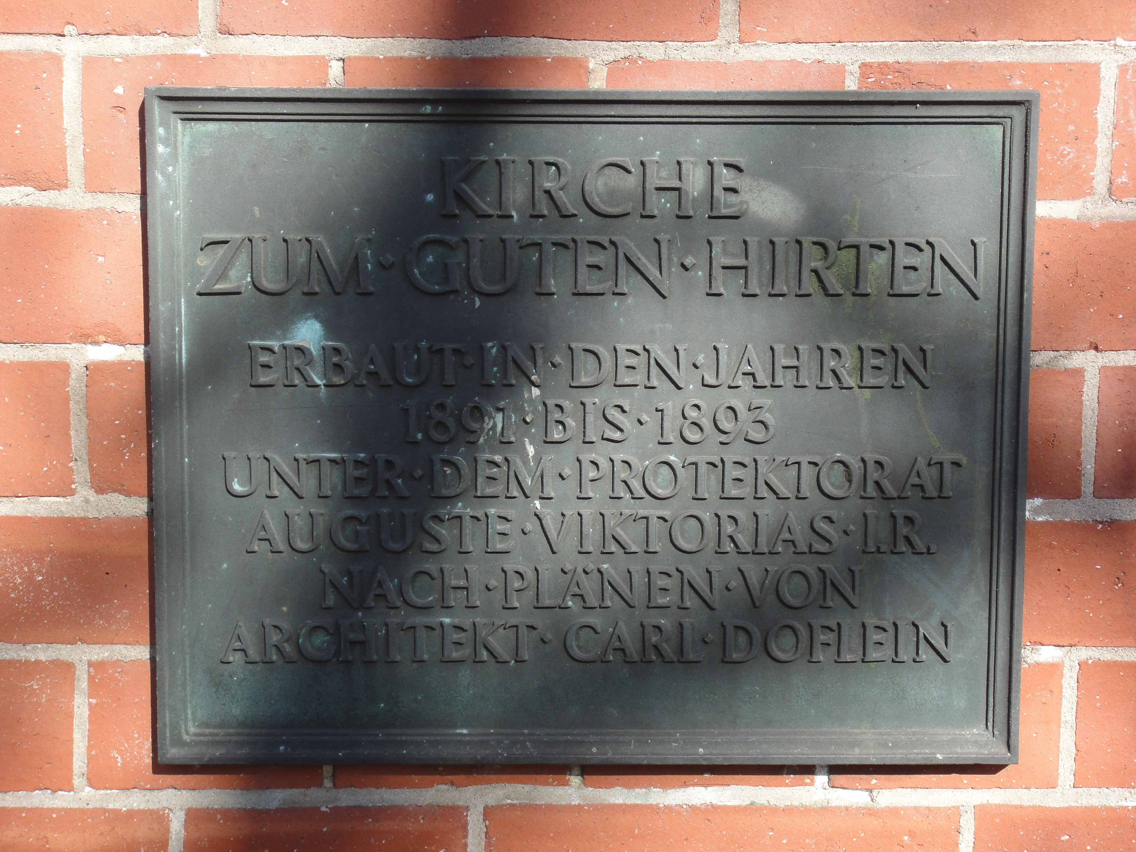 Gedenktafel an der Kirche "Zum Guten Hirten" auf dem Friedrich-Wilhelm-Platz in Berlin-Friedenau